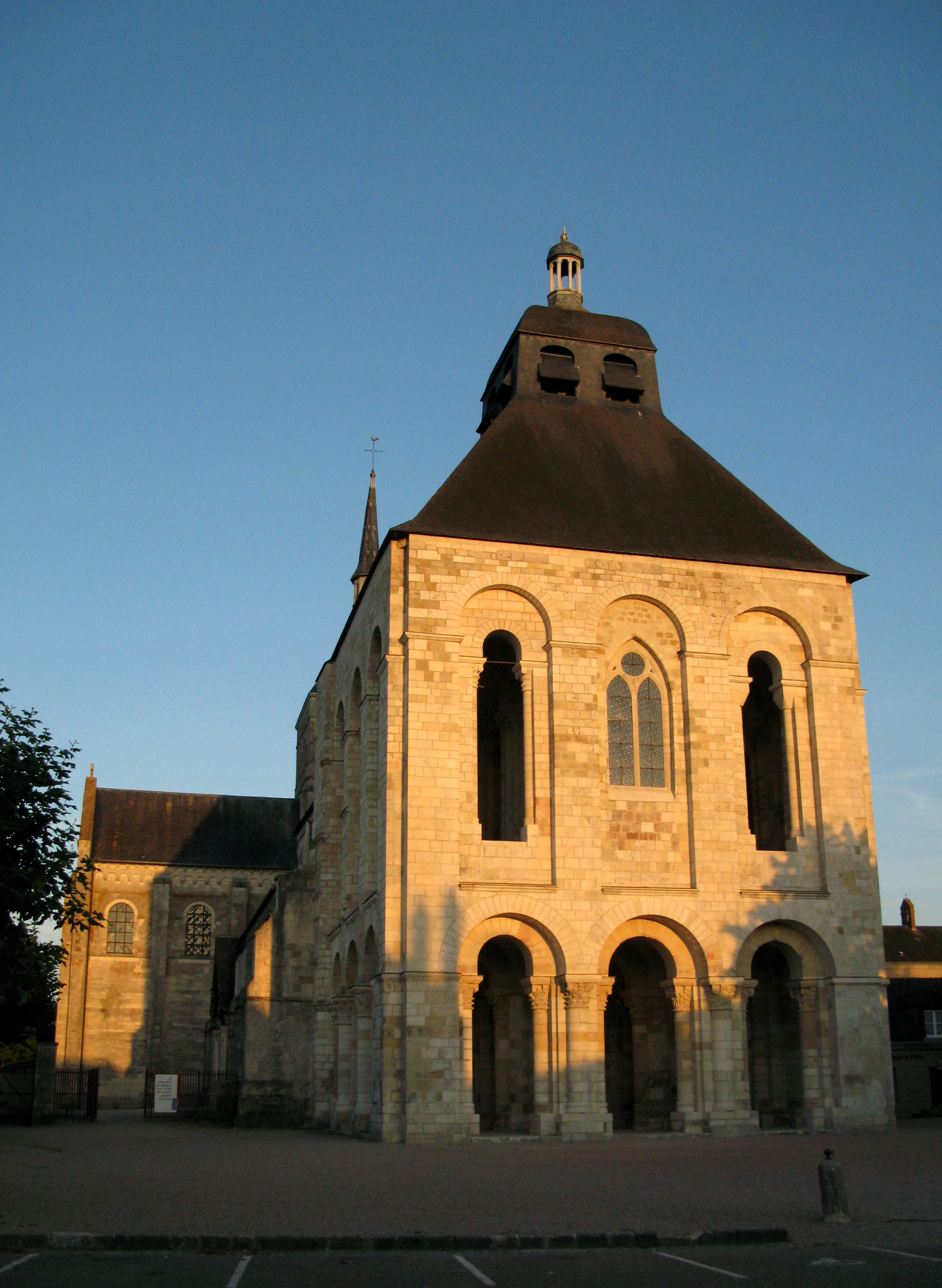 Saint-Benoît-sur-Loire (Loiret, France) - L'église. . .